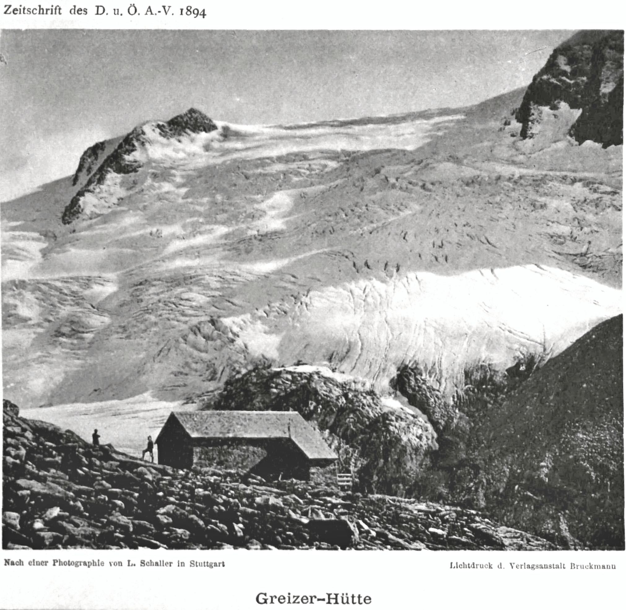 Greizer-Hütte aus Zeitschrift des Deutschen und Oesterreichischen Alpenvereins 1894 Band 25